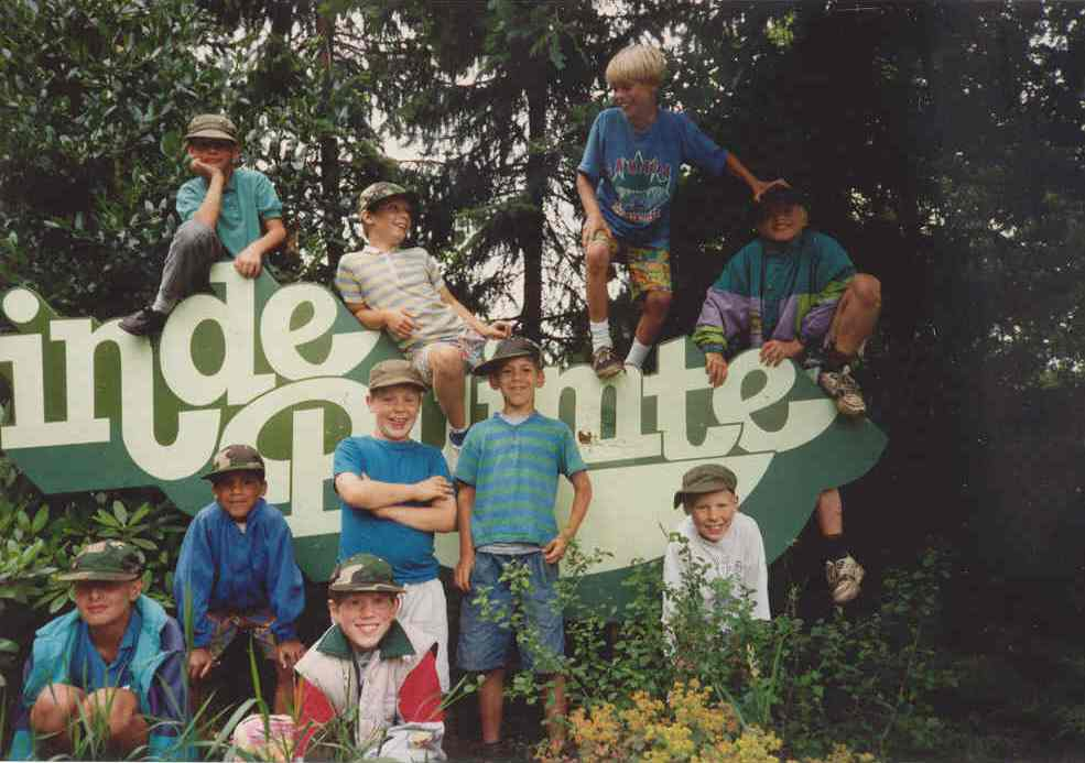 Vier jongens bij het logo van In de Ruimte, een evangelische organisatie, in Soest. Dit was tijdens één van de kinderkampen die In de Ruimte organiseerde